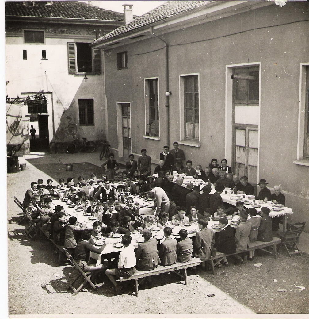 Mensa domenicale per i ragazzi delle cascine attorno a Spino d'Adda organizzata da Mons. Giovanni Quaini